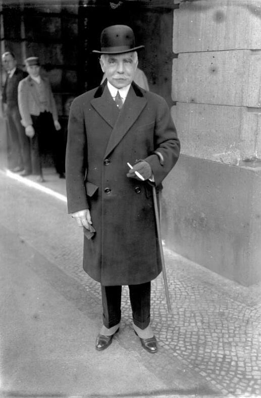 Der bekannte amerikanische Bankier und Multimillionär Otto H. Kahn weilt in Berlin! Der amerikanische Bankier Otto H. Kahn und Multimillionär vor dem Hotel Adlon in Berlin.